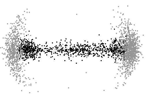 Вид троянцев и Гильд в плоскости эклиптики/